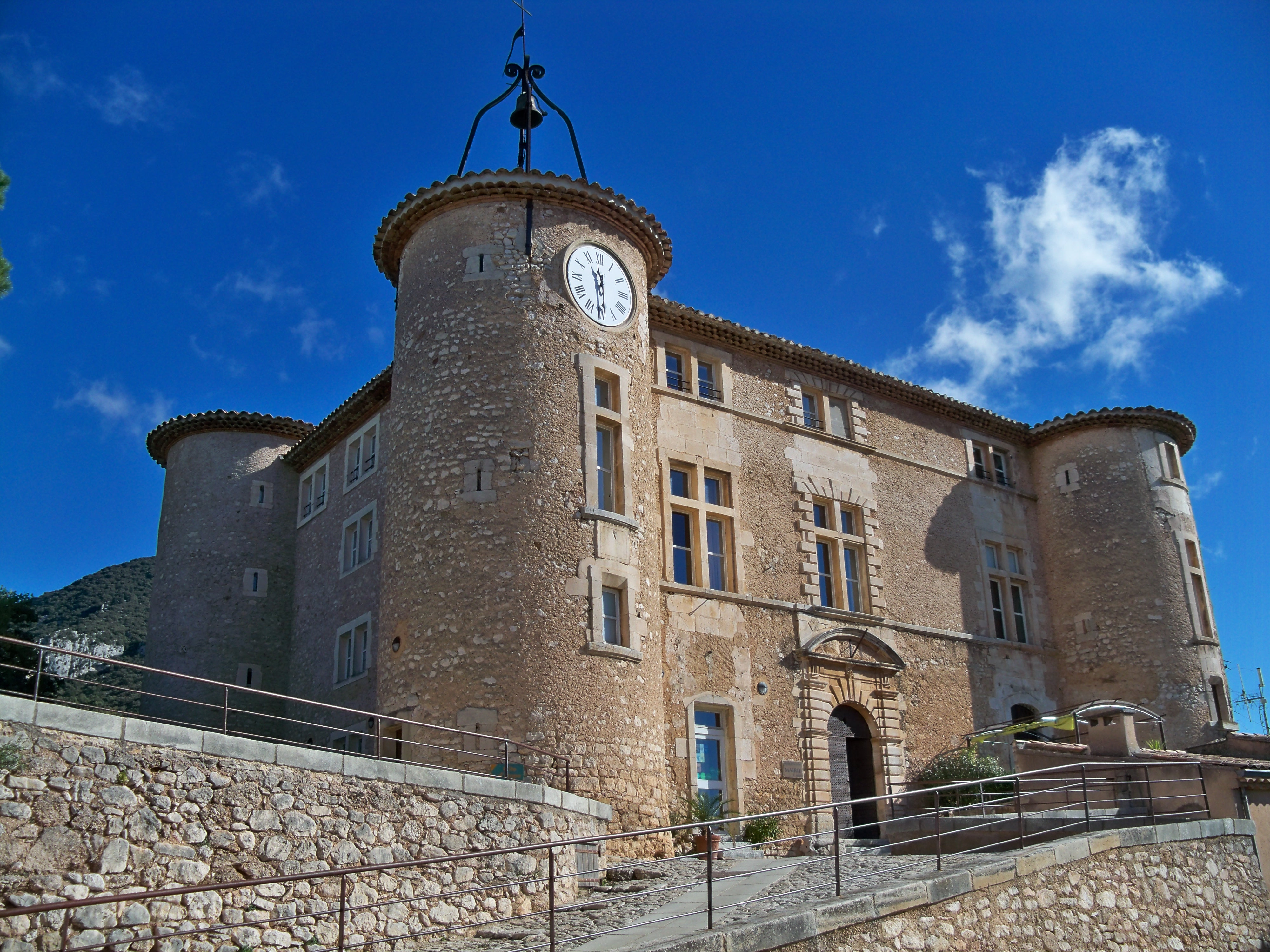 Chateau de Rustrel, Vauclue, France